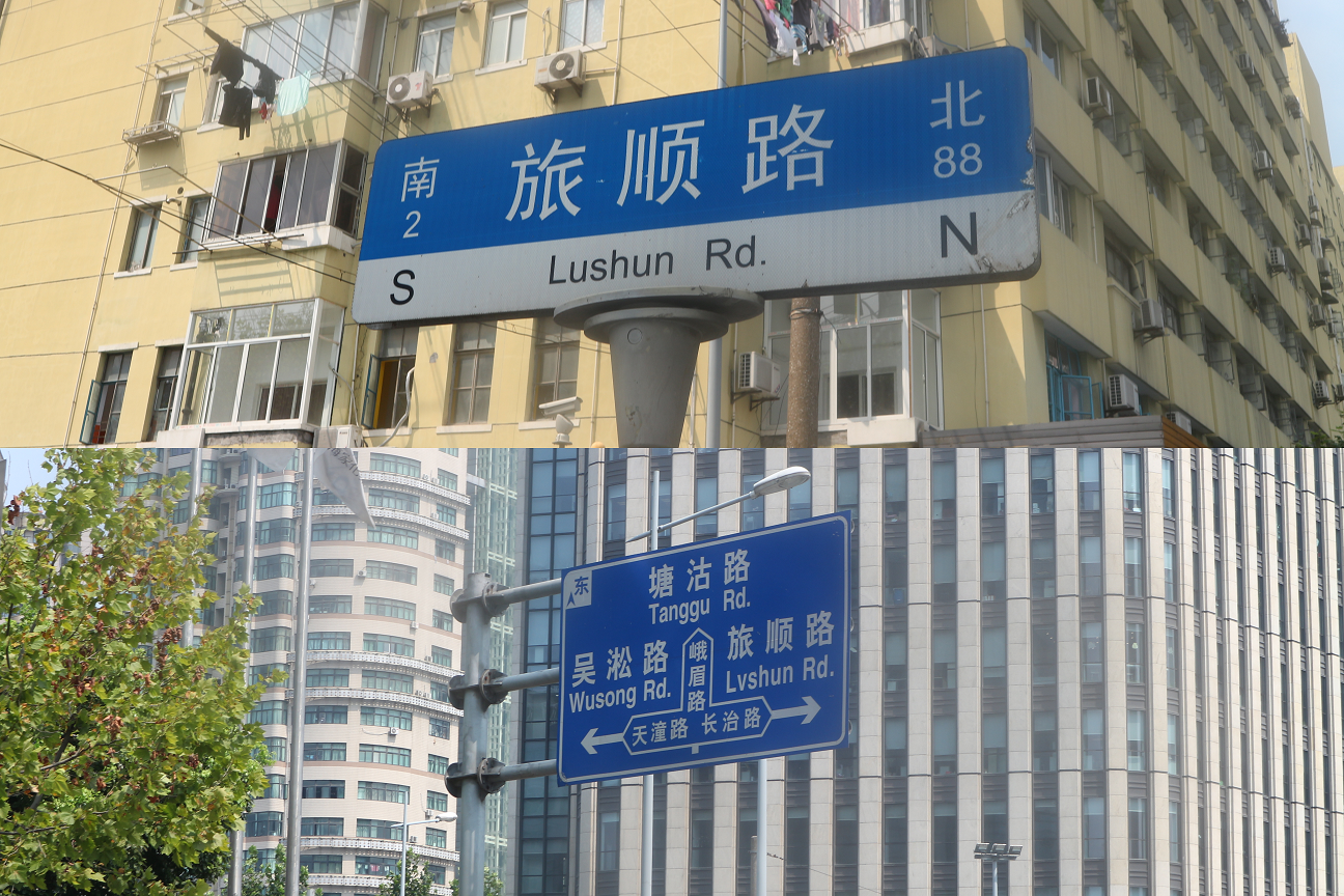 旅顺路（Lǚshùn Lù）的不同拼写。